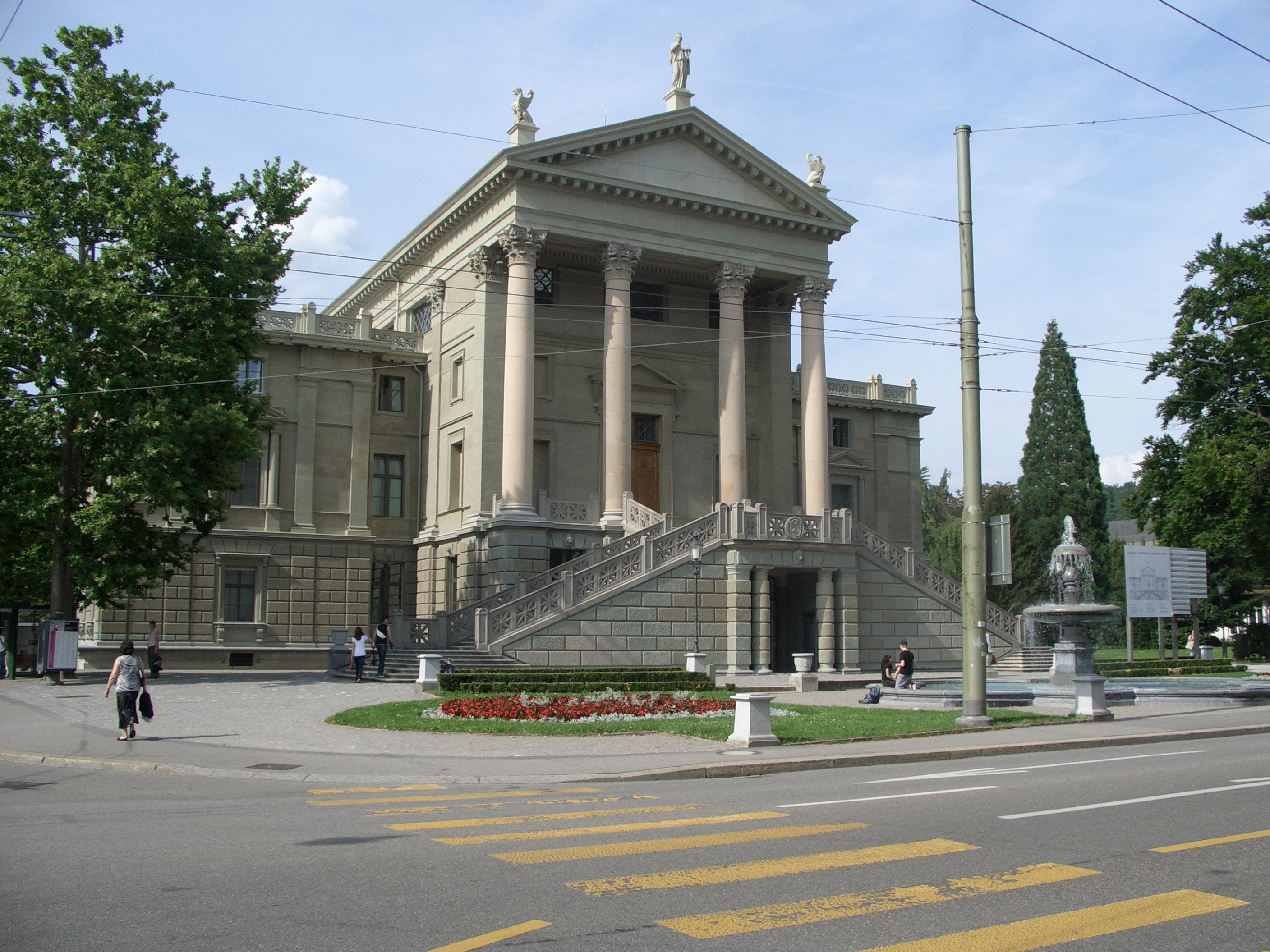 Das Stadthaus der Stadt Winterthur nach einem Entwurf von Gottfried Semper.